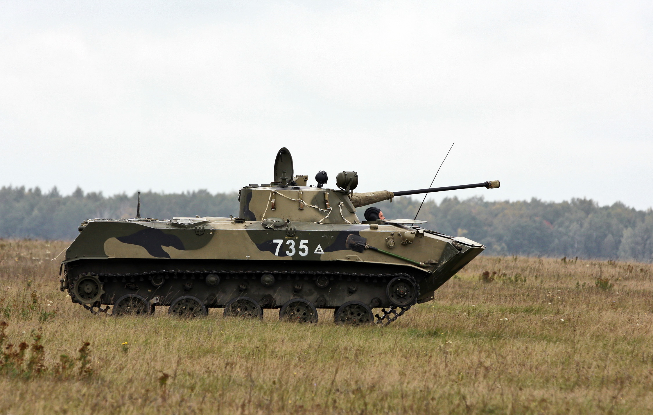 БМД-2 на тактических учениях 137-го гвардейского парашютно-десантного ордена Красной Звезды полка 106-й гвардейской воздушно-десантной дивизии. 28 сентября 2011 г., Рязанская область.